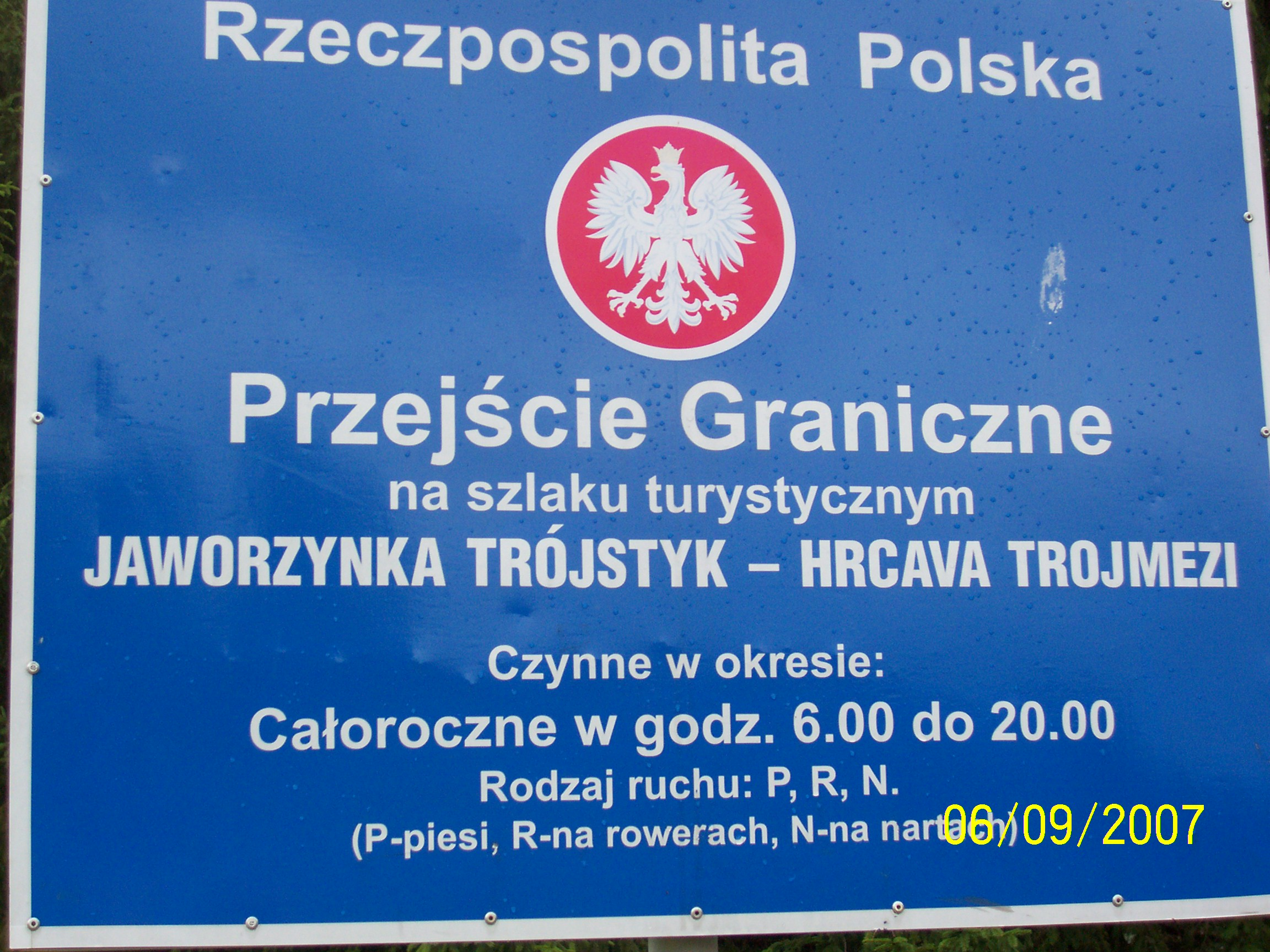 Hraniční přechod Jaworzynka - Hrčava z polské strany